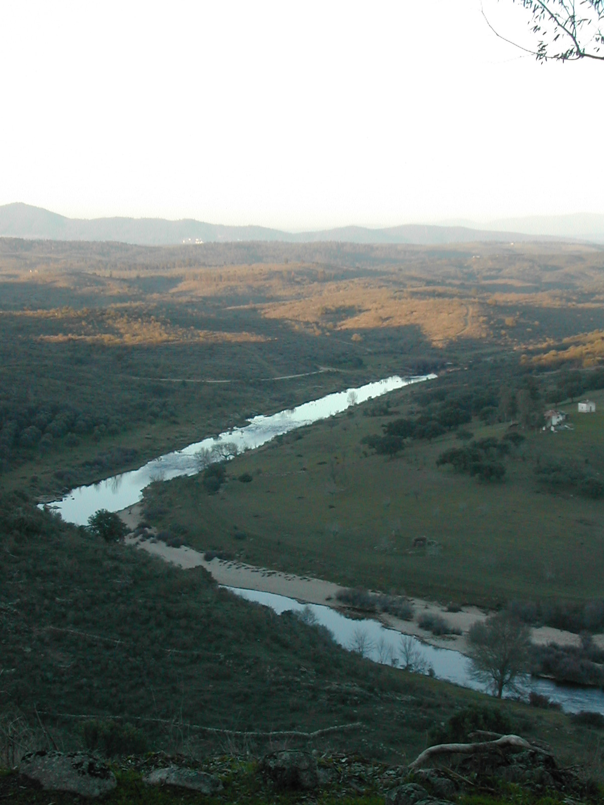 Rio Erges, Salvaterra do Extremo, Portugal